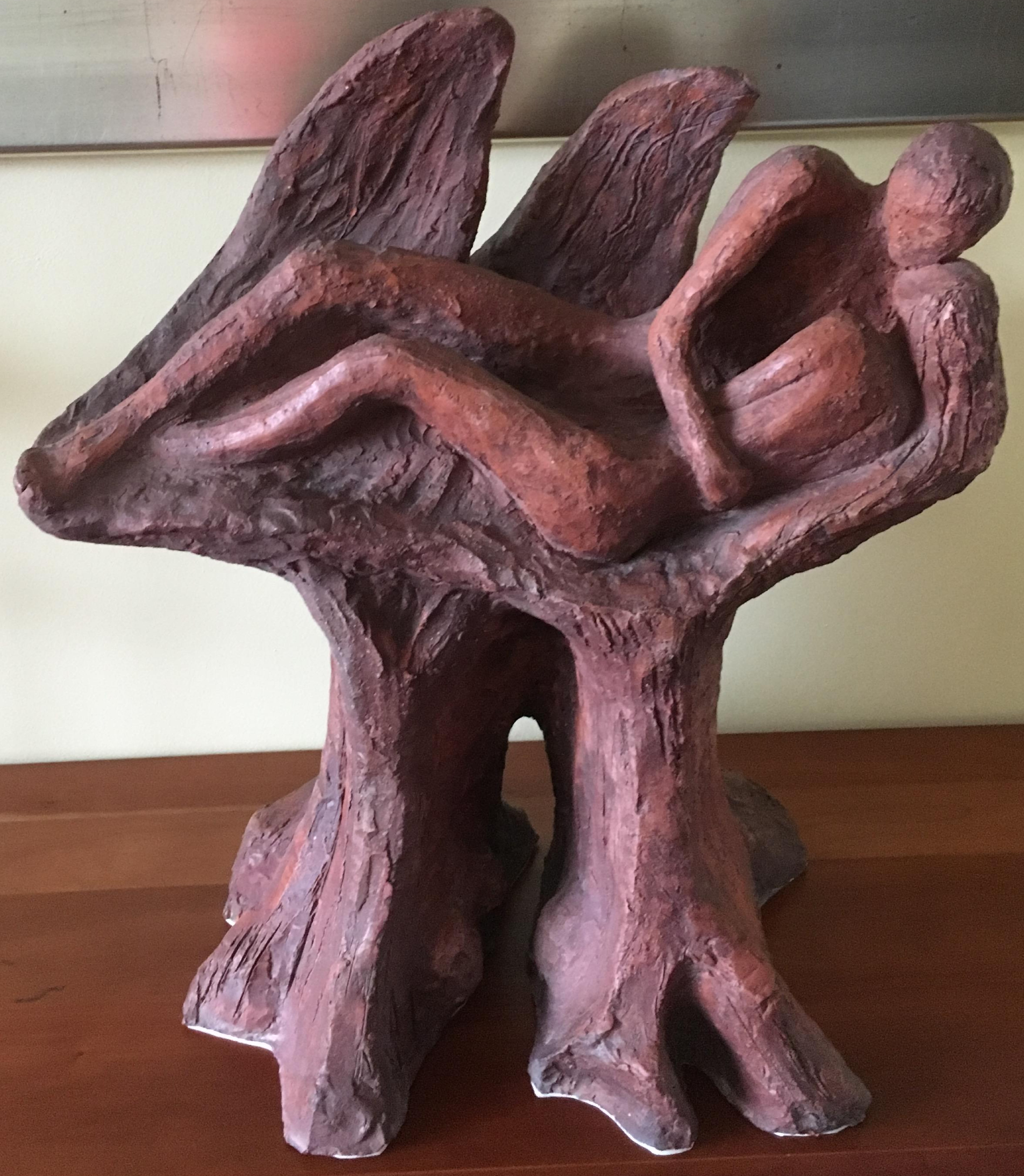 «Անժամանդրոս» - քանդակը